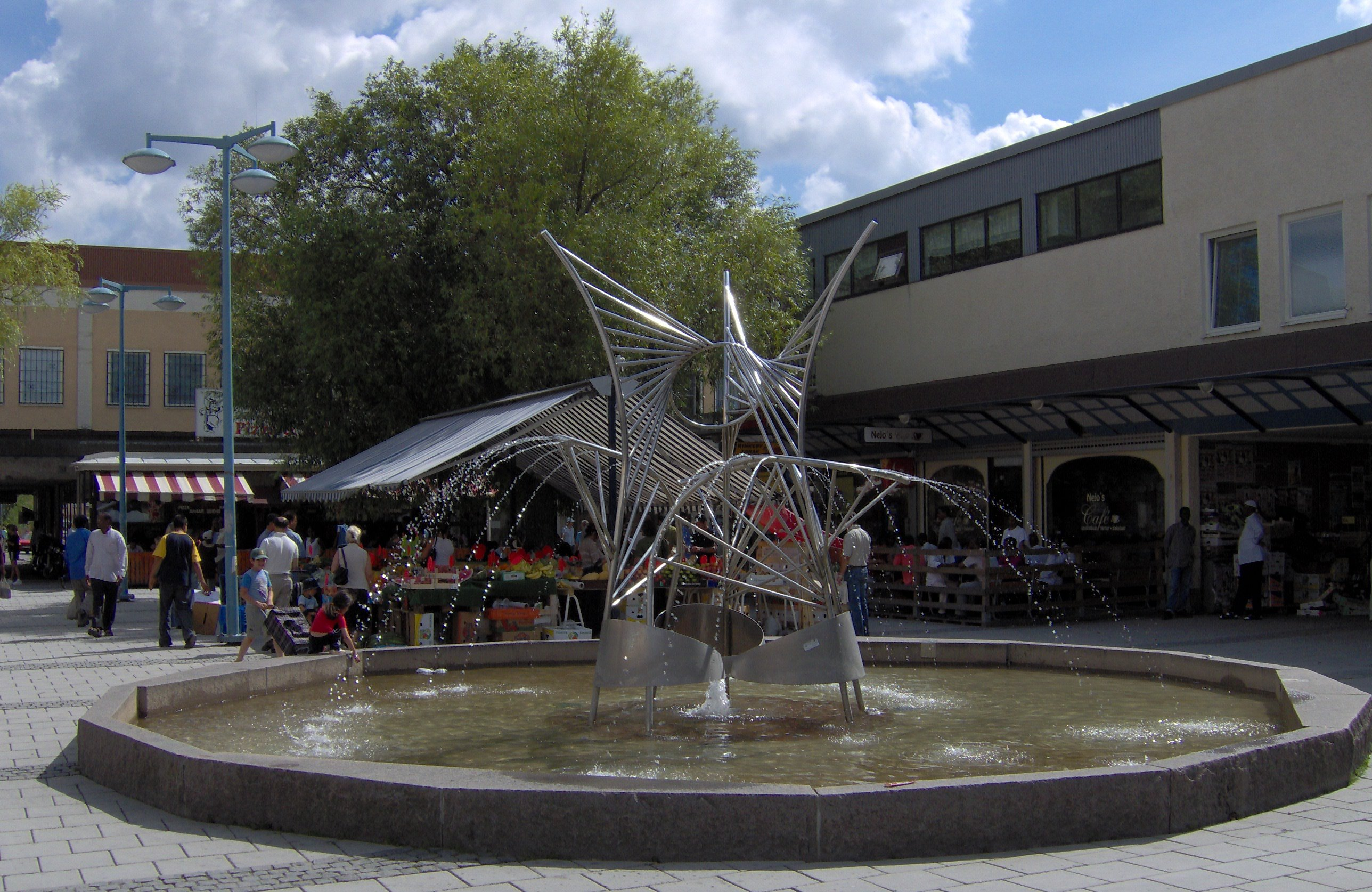 Stockholm suburb Rinkeby market place fountain. Retouched version available at Image:Rinkeby torg, fontän och grönsaksstånd retouched.jpg